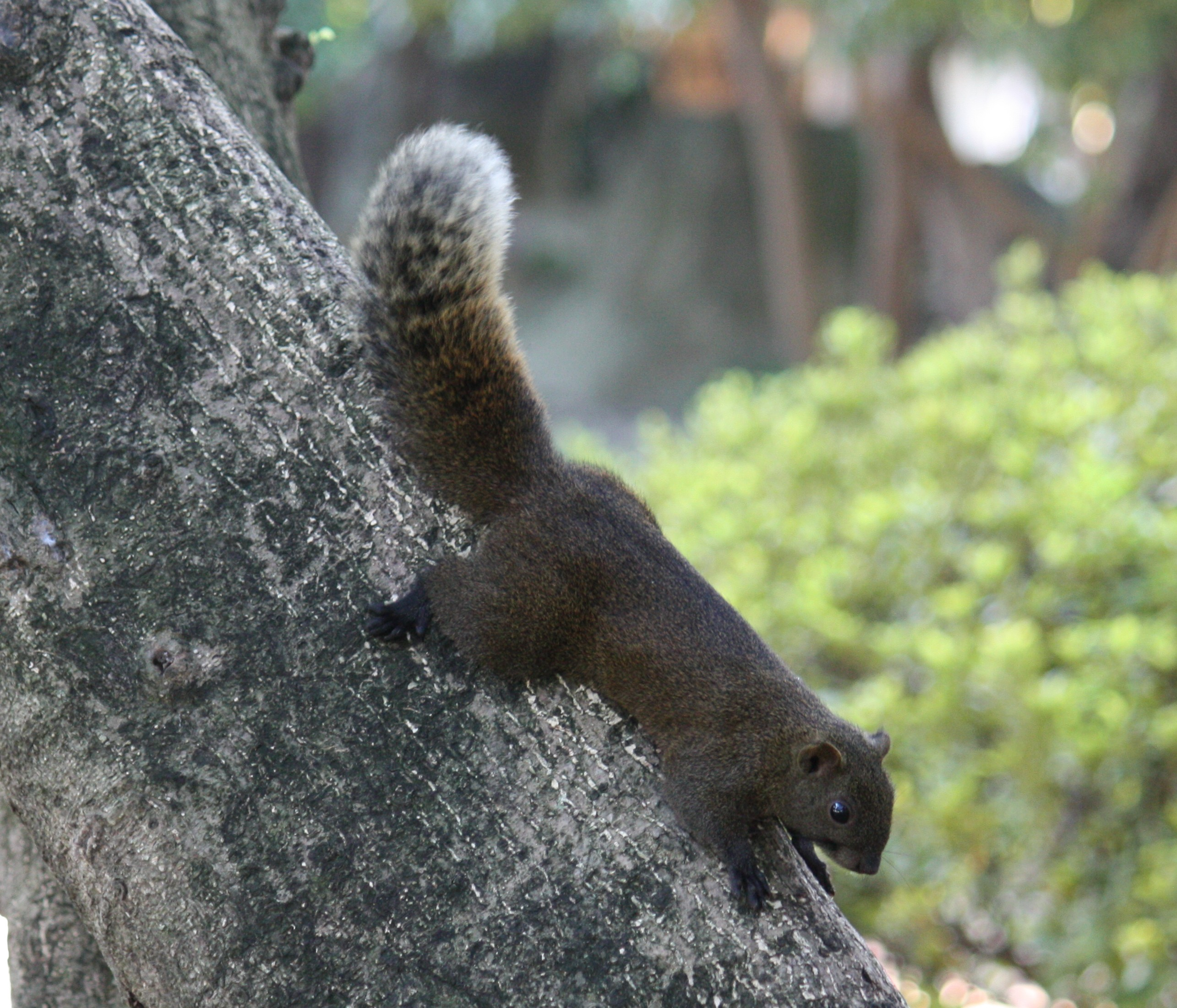 Ein Pallas-Hörnchen im Park von Taipeh, Taiwan